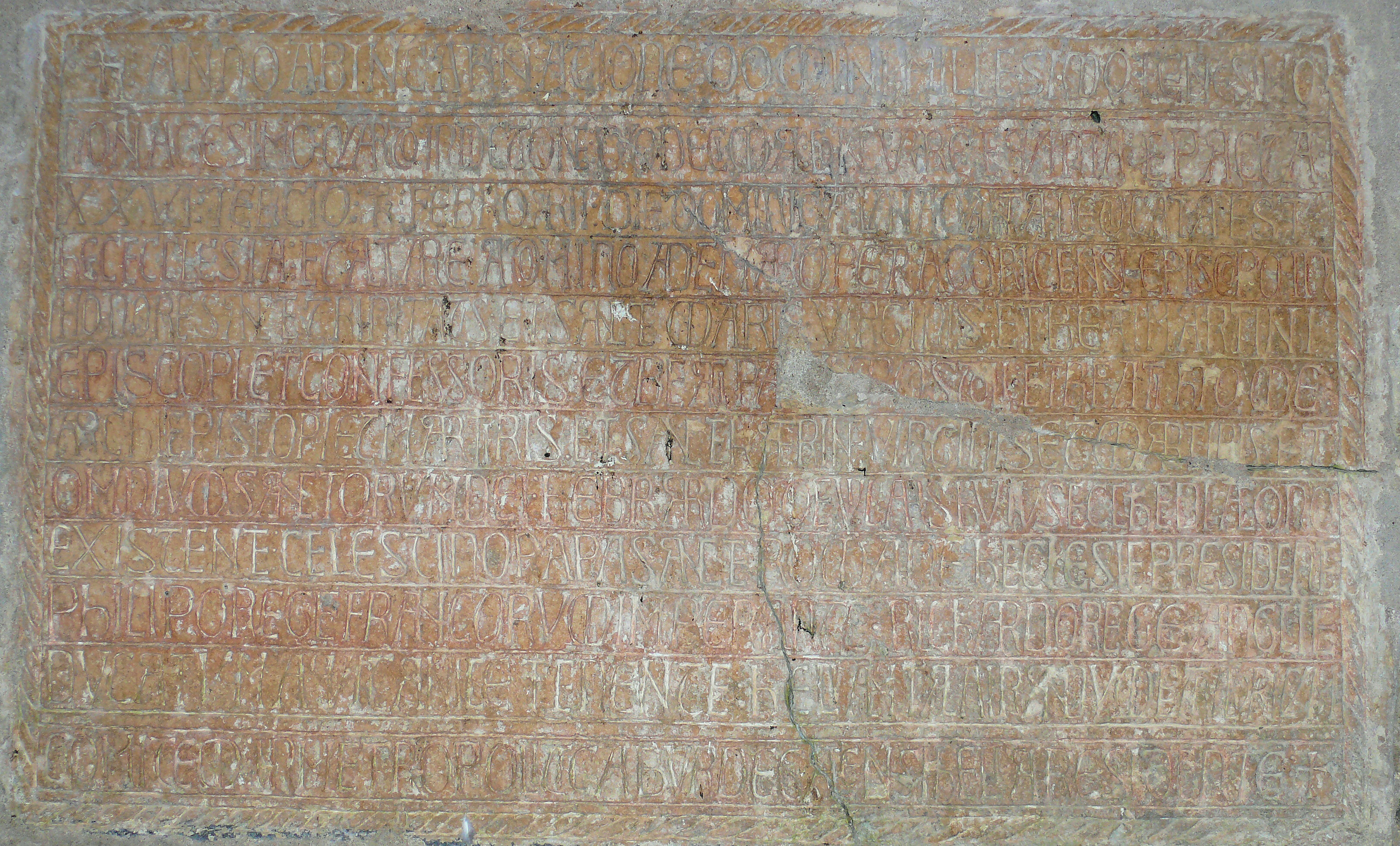 Limeuil - Eglise Saint-Martin - Pierre de dédicade de l'église en 1194 à saint Thomas Becket et saint Martin